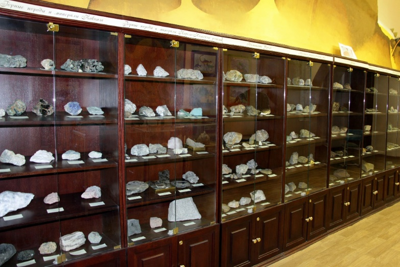 Татарча/tatarça: Халымбаджа1